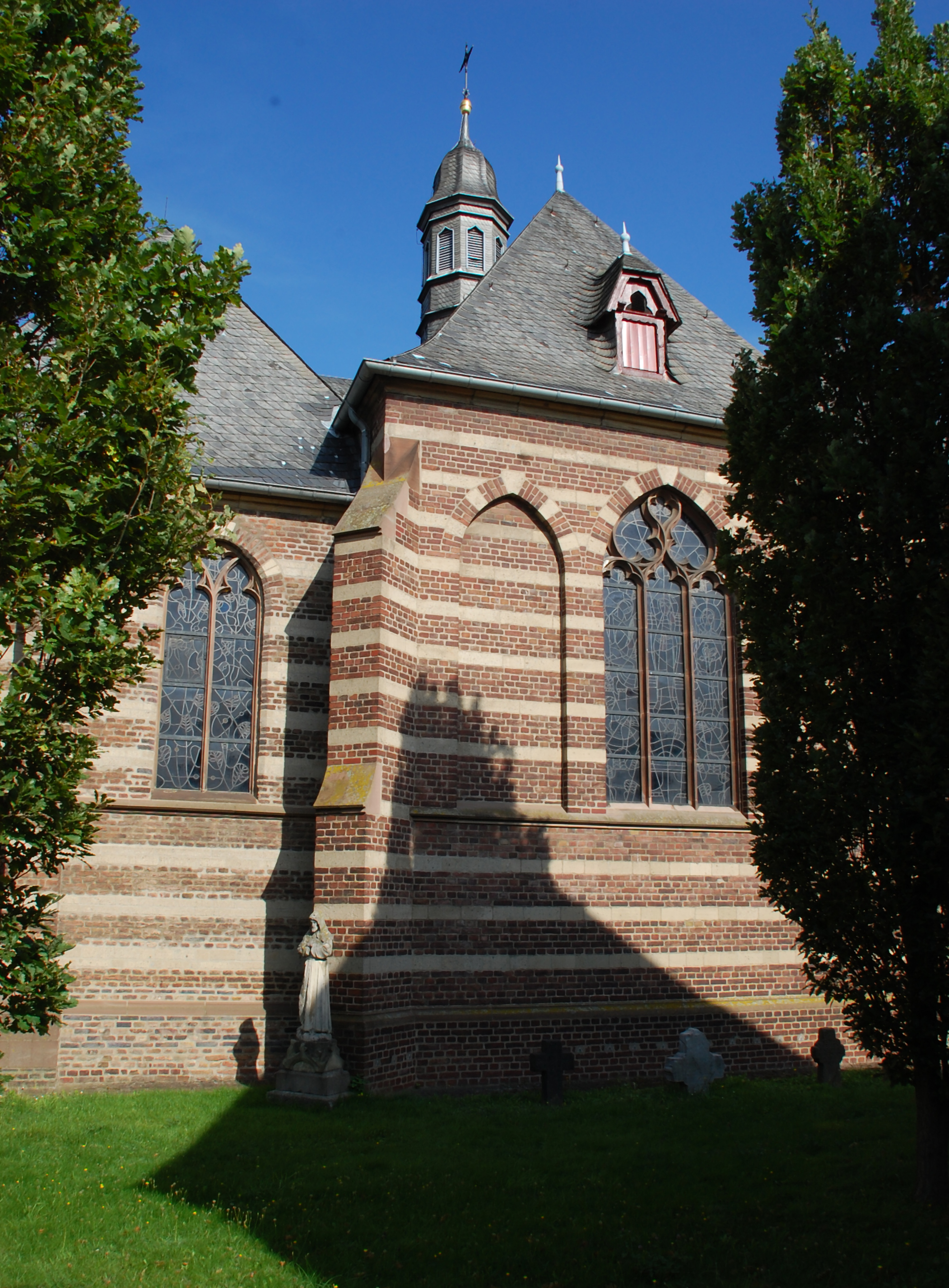 Pfarrkirche St. Kosmas und Damian in Glesch, Bergheim